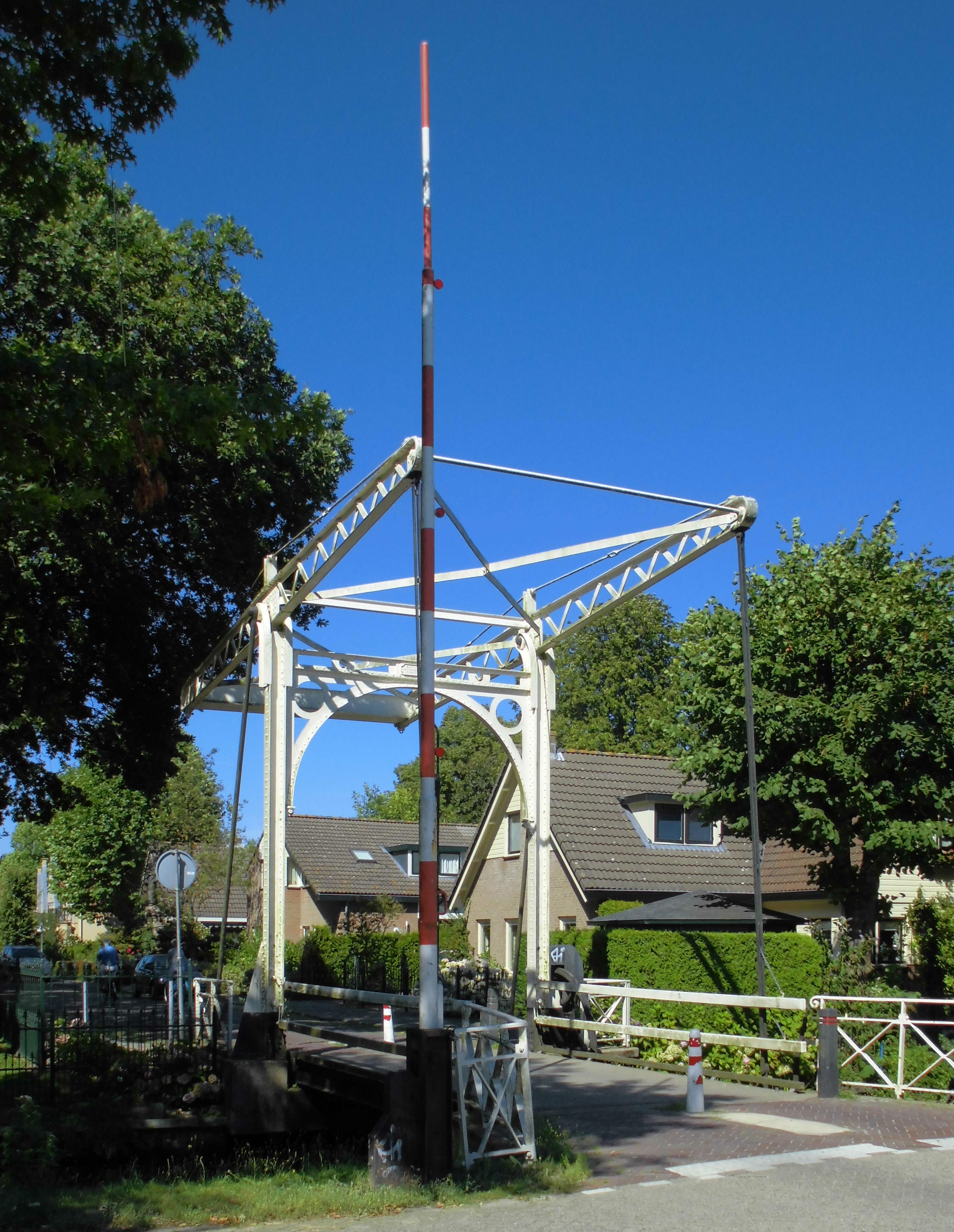 Ophaalbrug over de Danne te Breukelen